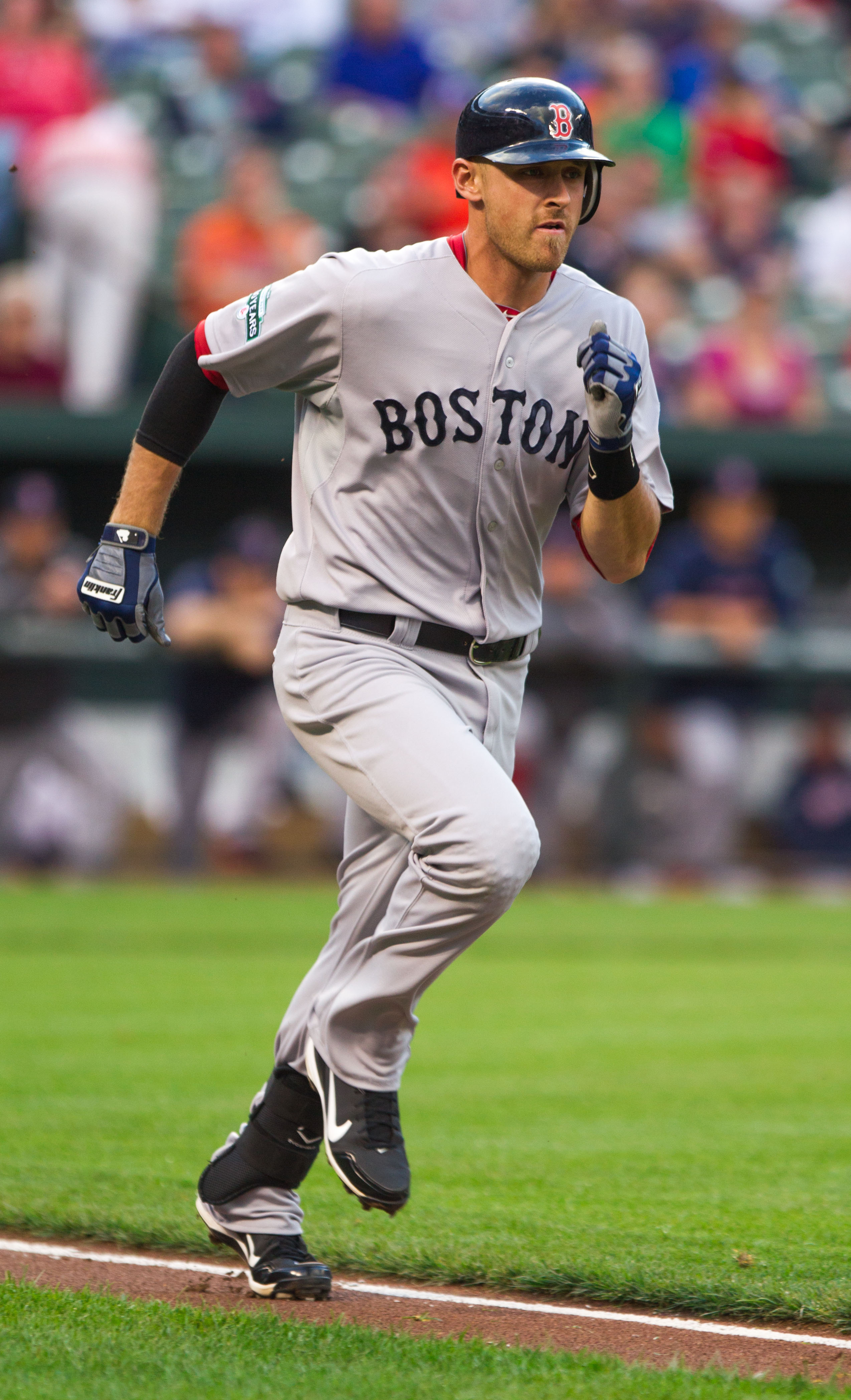 Will Middlebrooks